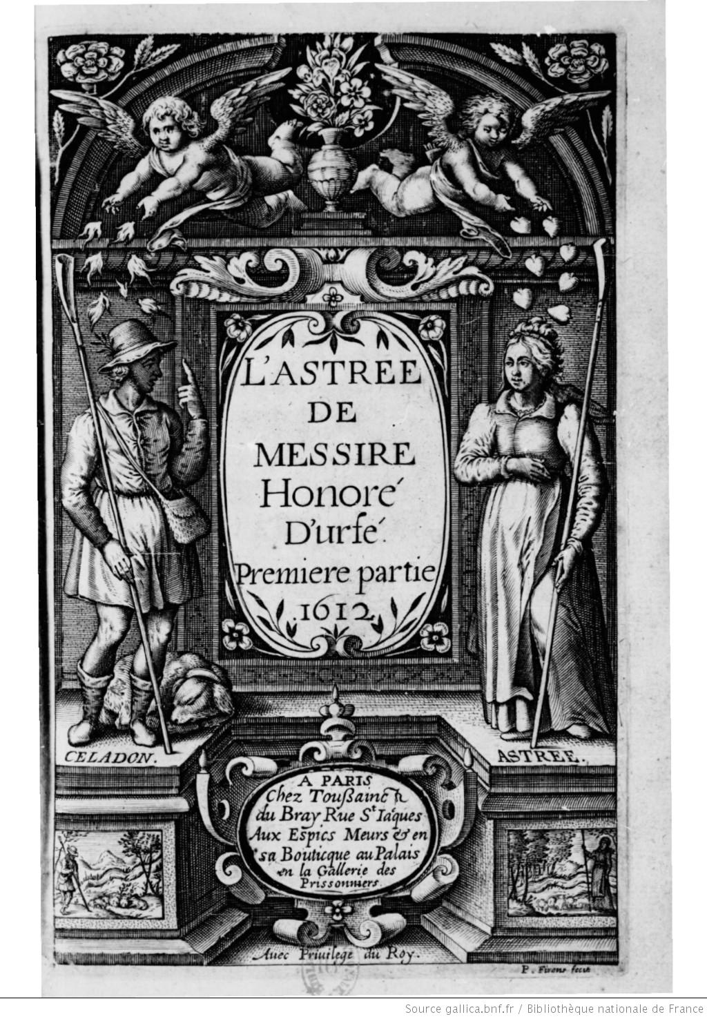 Frontispice du premier volume de L'Astrée, roman d'Honoré d'Urfé, édition Le Bray, Paris, 1612